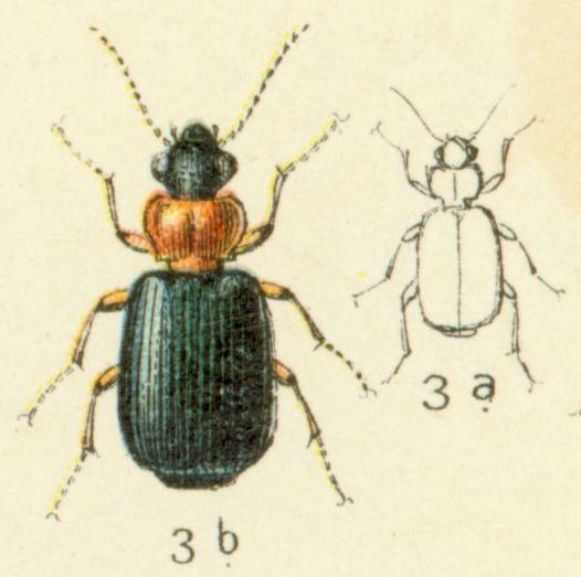 [Lebia] cyanocephala L. = Lebia cyanocephala (Linnaeus, 1758) (3a: adult, size comparison, 3b: adult, dorsal view)